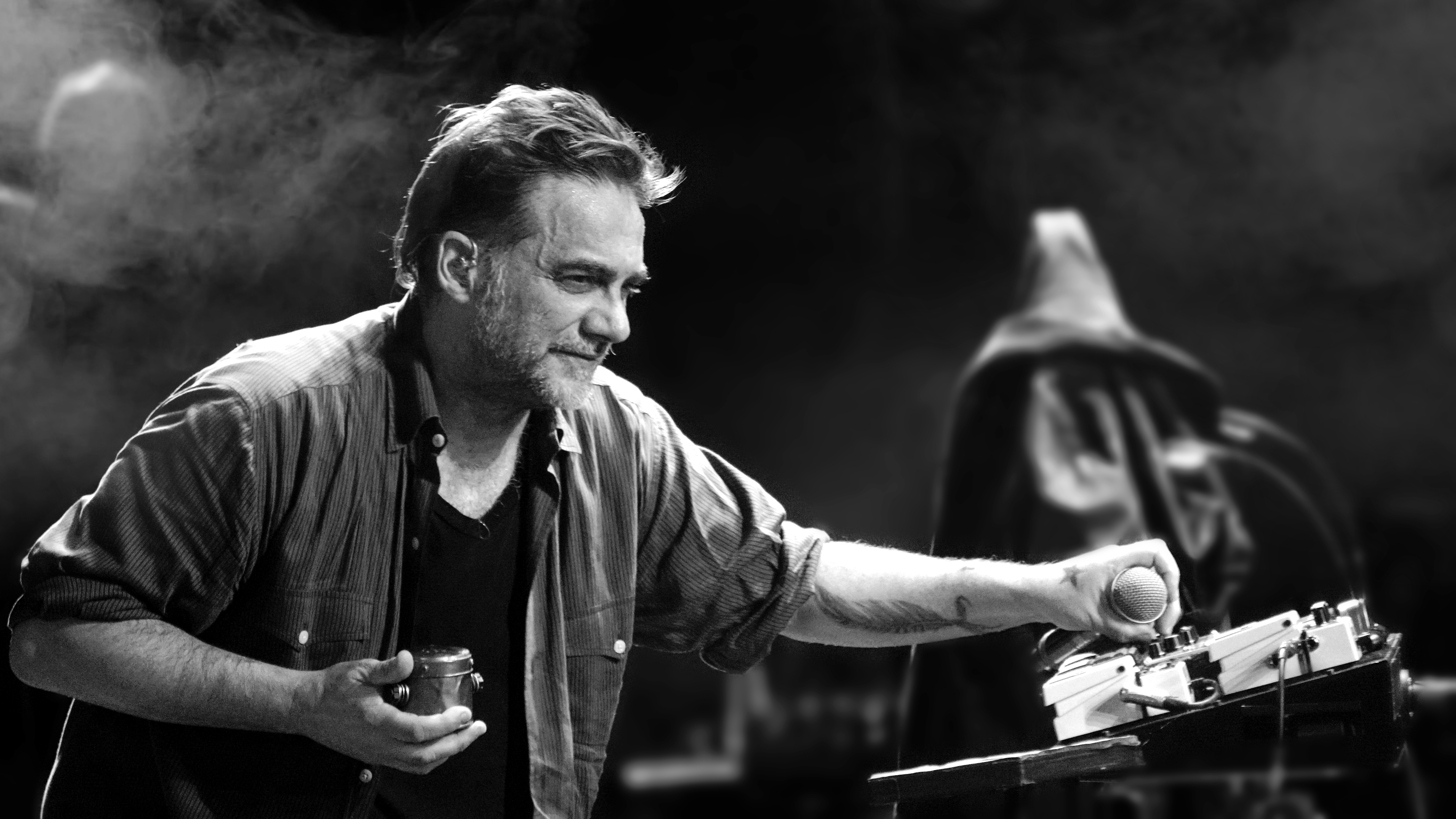 Participación de Vicentico junto a su banda en el festival Tecate Coordenada, en la ciudad de Guadalajara, Mexico, fotografía capturada por el cineasta Colombiano Diego B. Delgado.